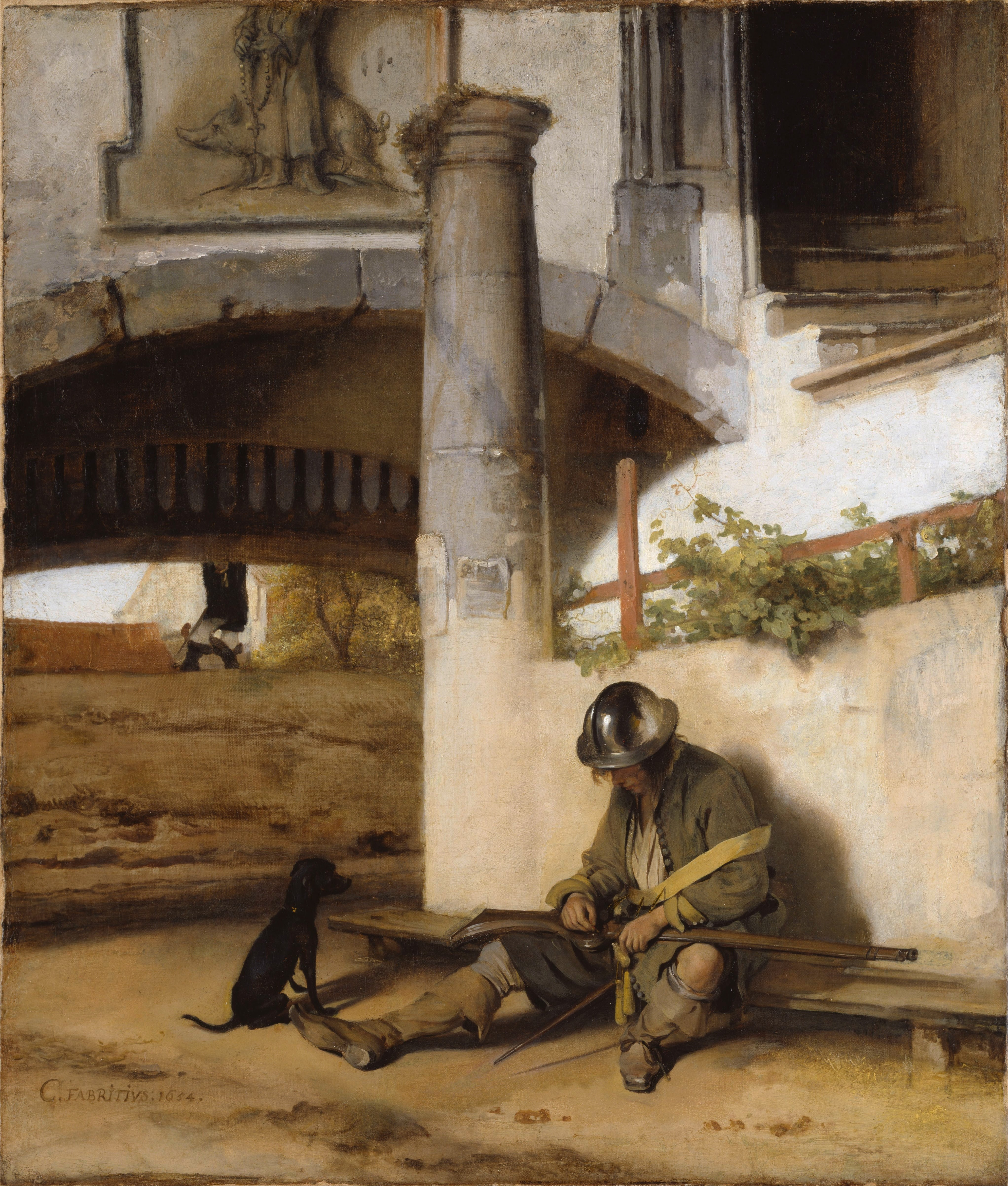 after restoration 2005